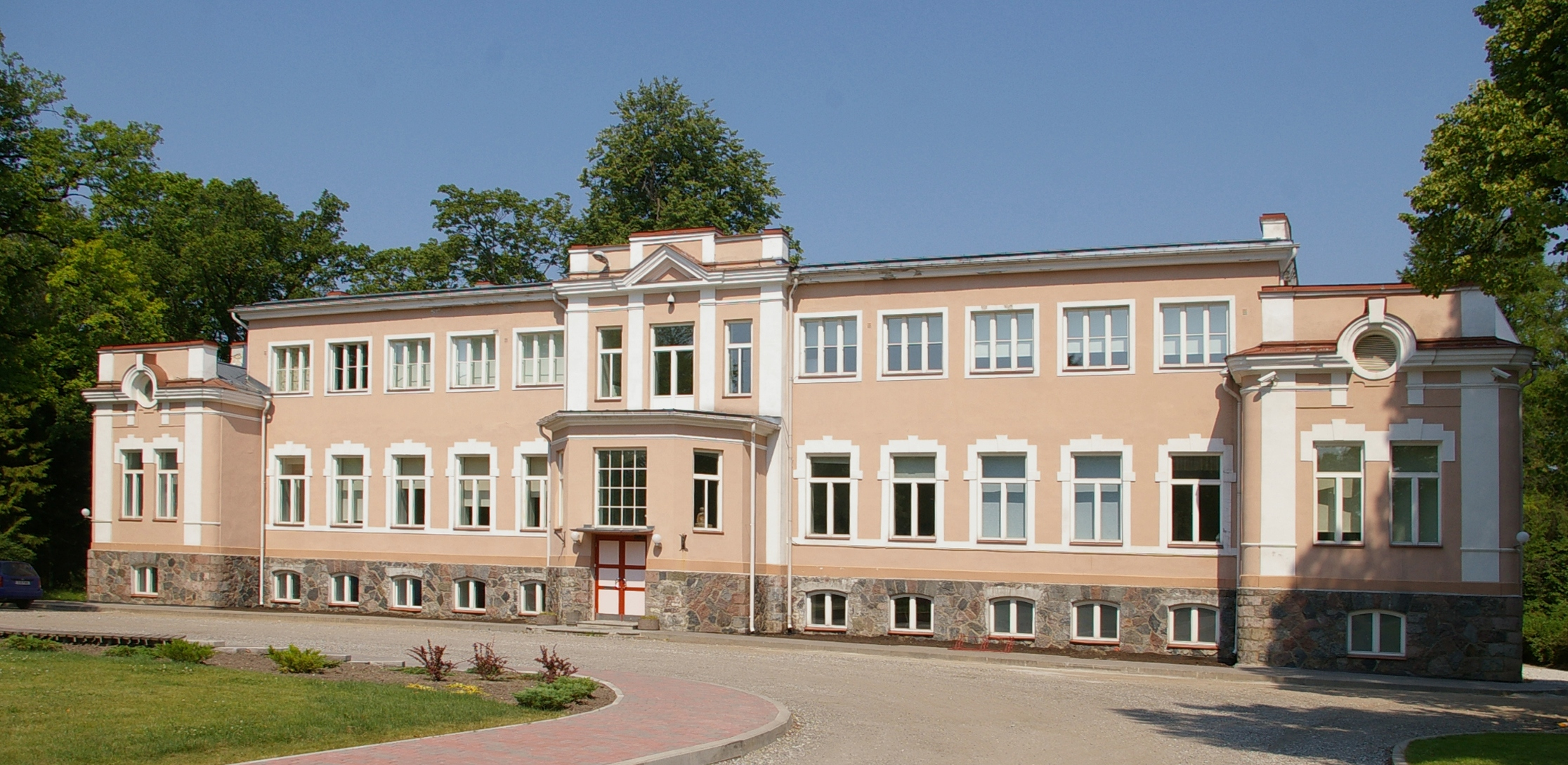 Tohisoo mõis (sks Tois) on asutatud 17 sajandil. Praegune historitsistlik peahoone valmis mõisas 1910tel aastatel. Asukoht: Rapla maakond, Kohila vald, Kohila alev